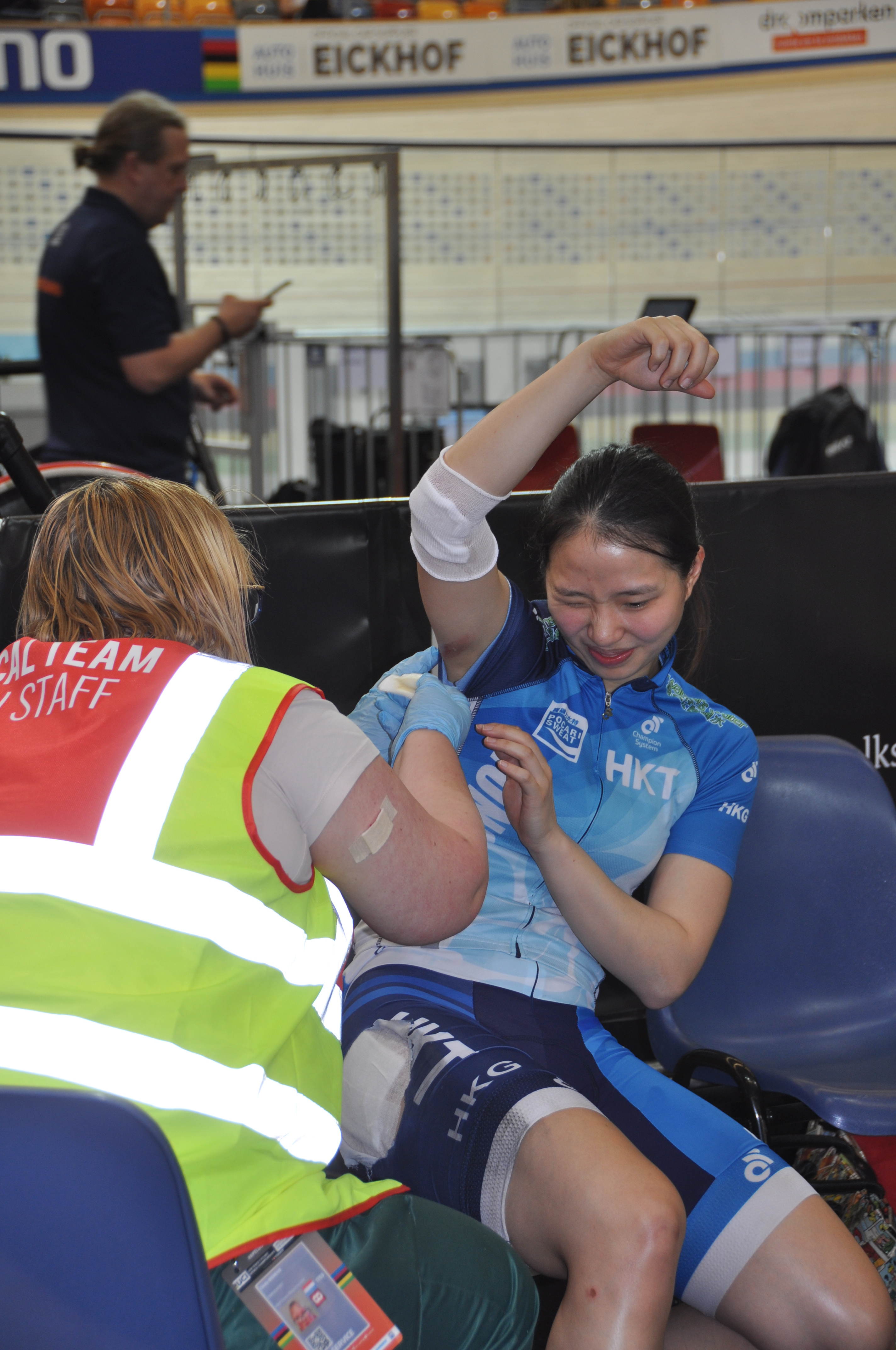 Vivian Ma Wing-yu, Radsportlerin aus Hongkong